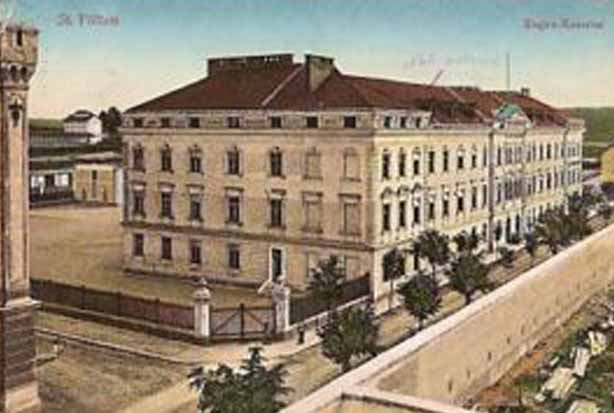 Eugen Kaserne in St. Pölten